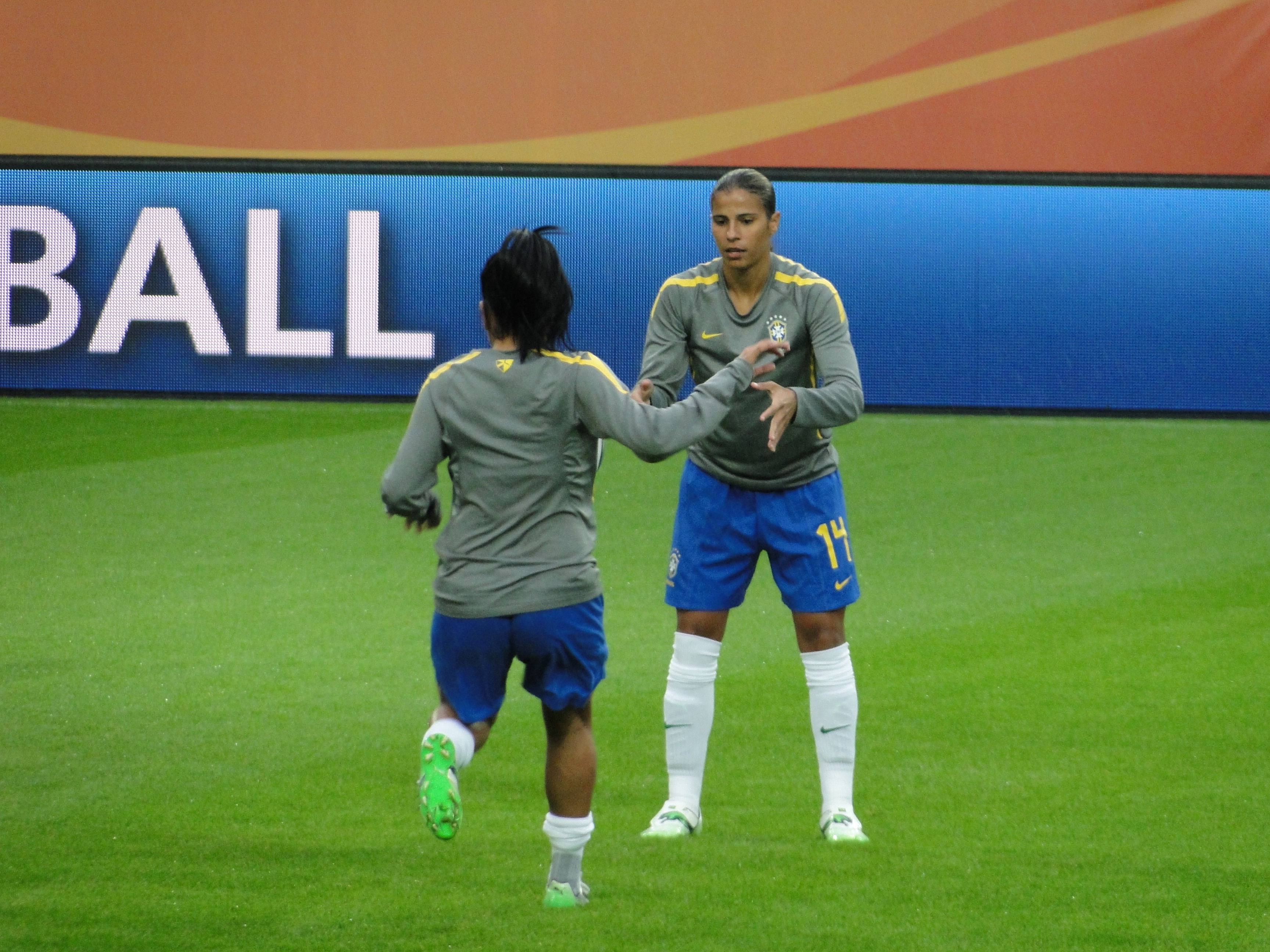 Fabiana da Silva Simões - Match de phase de groupes de la coupe du monde entre le Brésil et la Norvège le 3 juillet 2011 à Wolfsbourg